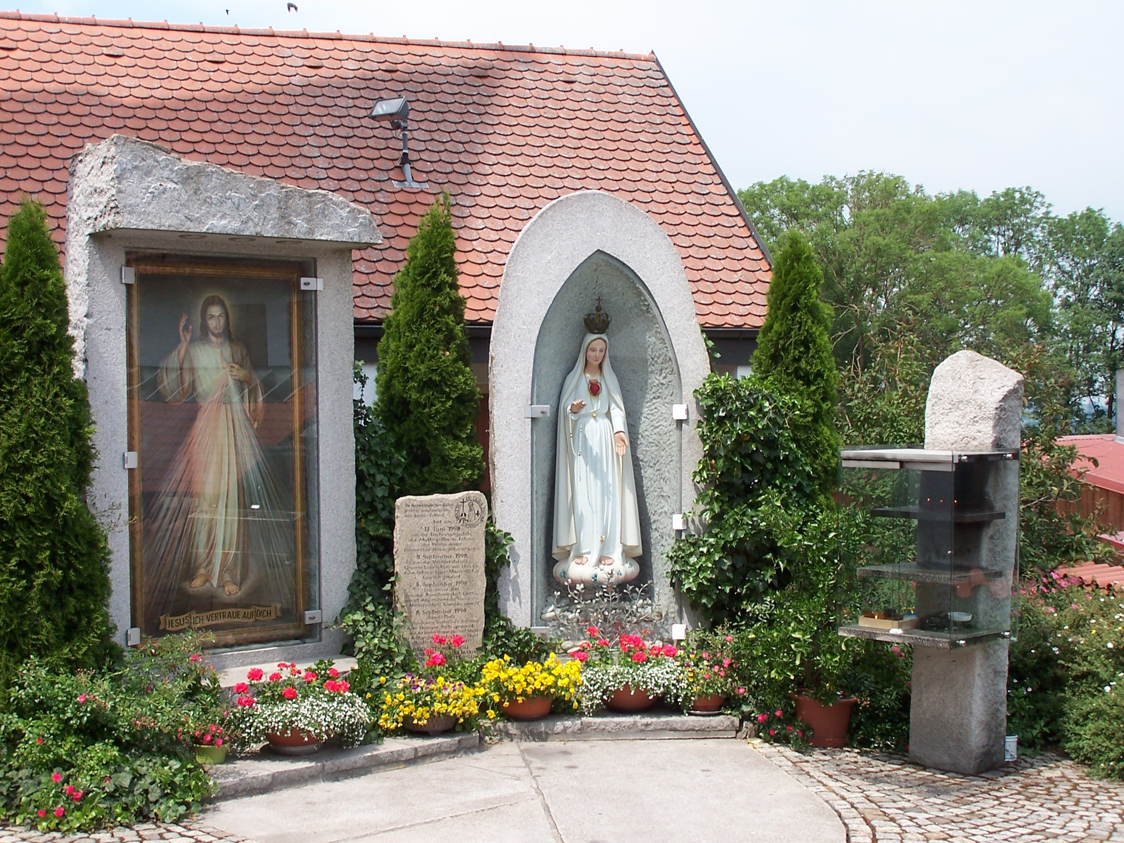 Laberweinting, Haader 20. Katholische Filialkirche St. Pauli Bekehrung. Gleichzeitig ist sie Wallfahrtskirche "Zu unserer lieben Frau von Haader". Hier der sogenannte "Heilige Platz" nördlich der Kirche.